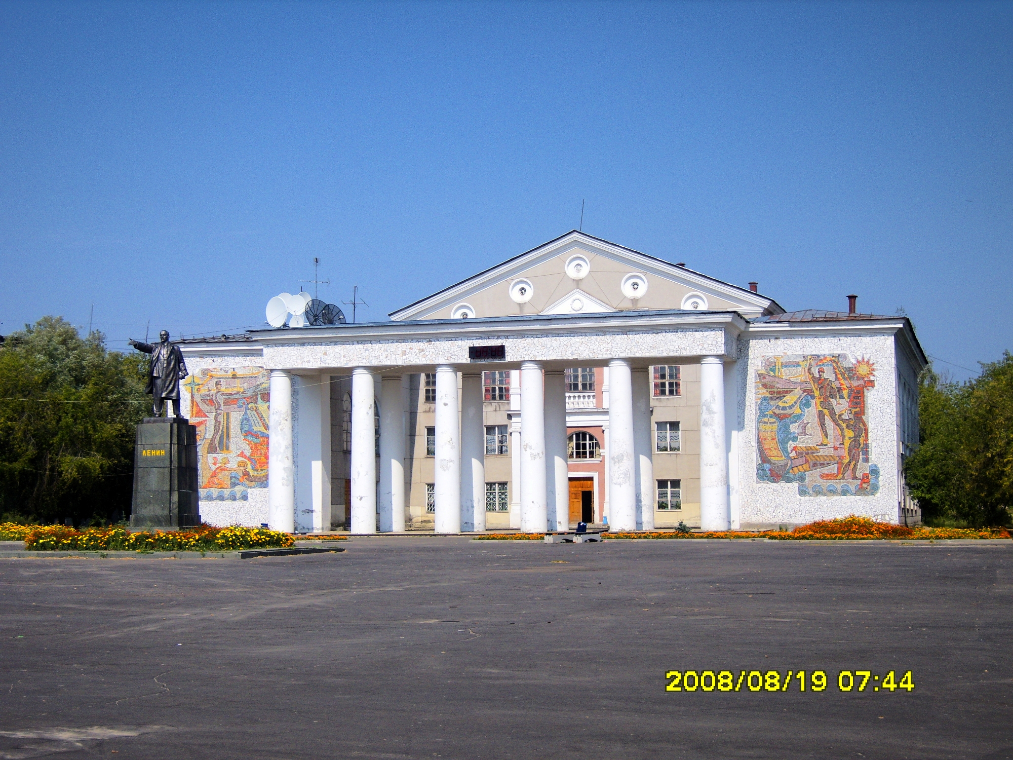 г.Навашино советская постройка. 2008г